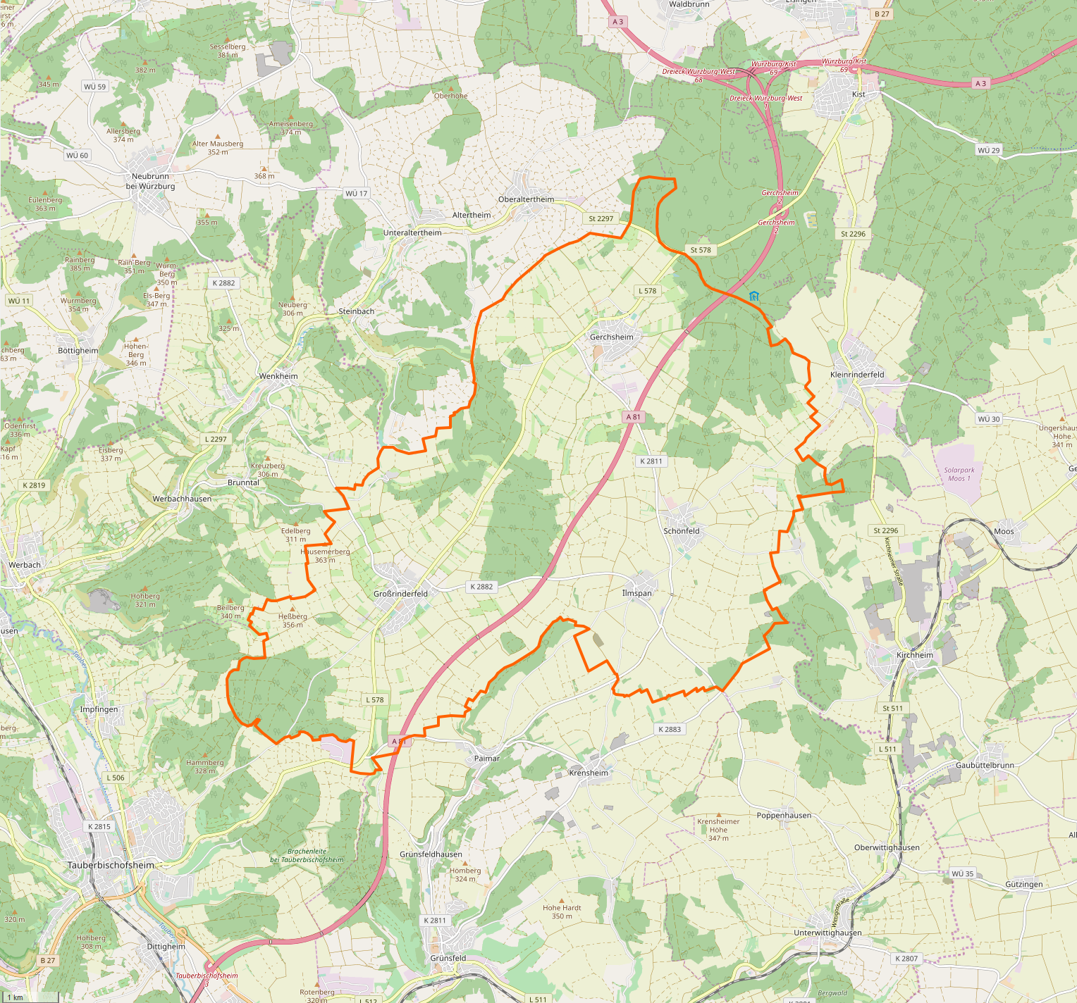 Gemarkung und Lage der Gemeinde Großrinderfeld. Siehe auch: Liste der Kulturdenkmale in Großrinderfeld. Liste der Straßennamen von Großrinderfeld. Gemarkungen und Lagen der Städte und sonstigen Gemeinden im Main-Tauber-Kreis: Ahorn · Assamstadt · Bad Mergentheim · Boxberg · Creglingen · Freudenberg · Großrinderfeld · Grünsfeld · Igersheim · Königheim · Külsheim · Lauda-Königshofen · Niederstetten · Tauberbischofsheim · Weikersheim · Werbach · Wertheim · Wittighausen